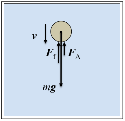 Fluido baten barnean grabitatearen eraginez bertikalki erortzen ari den gorputz solido batean eragiten ari diren indarrak